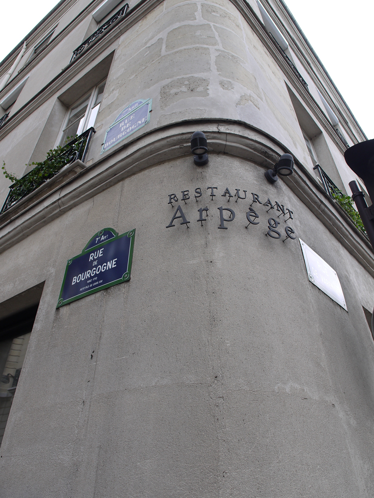 Arpège: 84 rue de Varennes 75007 Paris 01 45 51 47 33